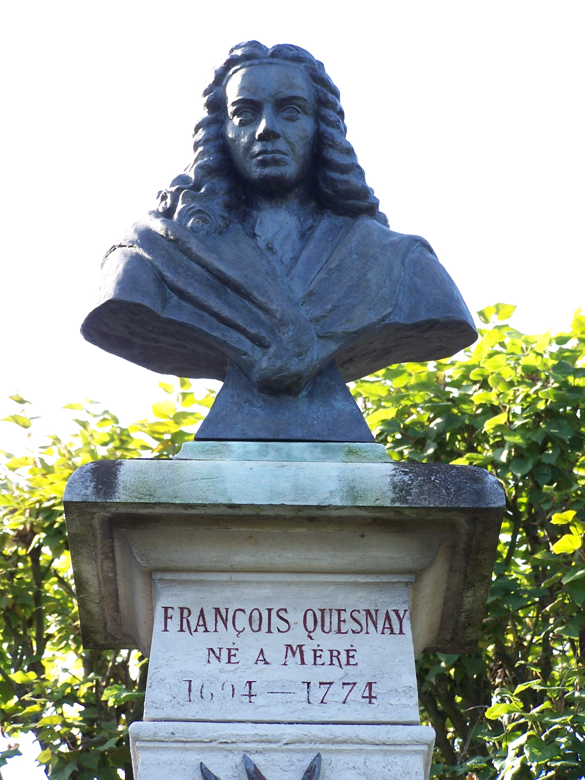 Buste de François Quesnay à Méré (Yvelines, France)